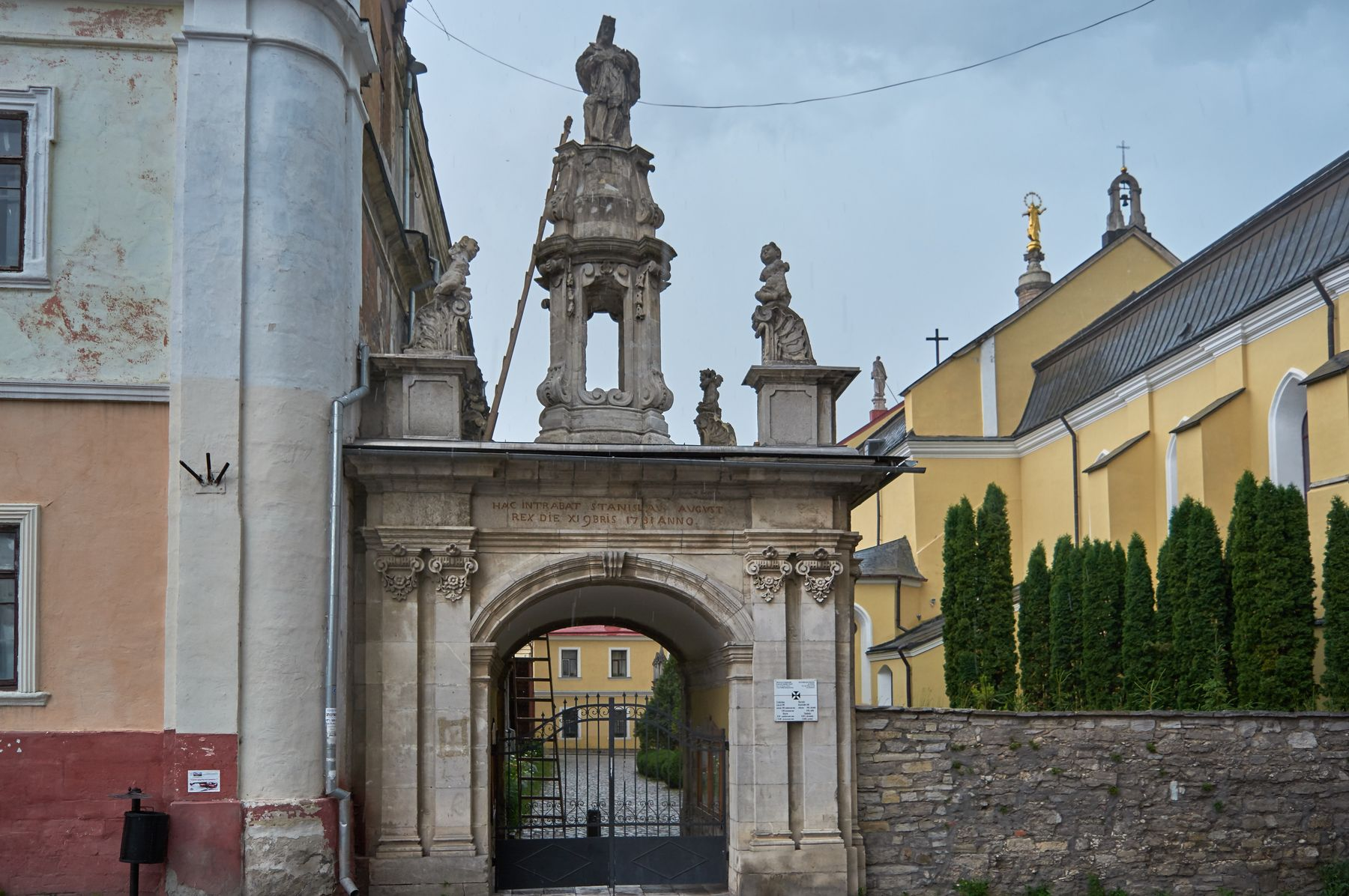 Брама, Кам'янець-Подільський, вул. Татарська, 20